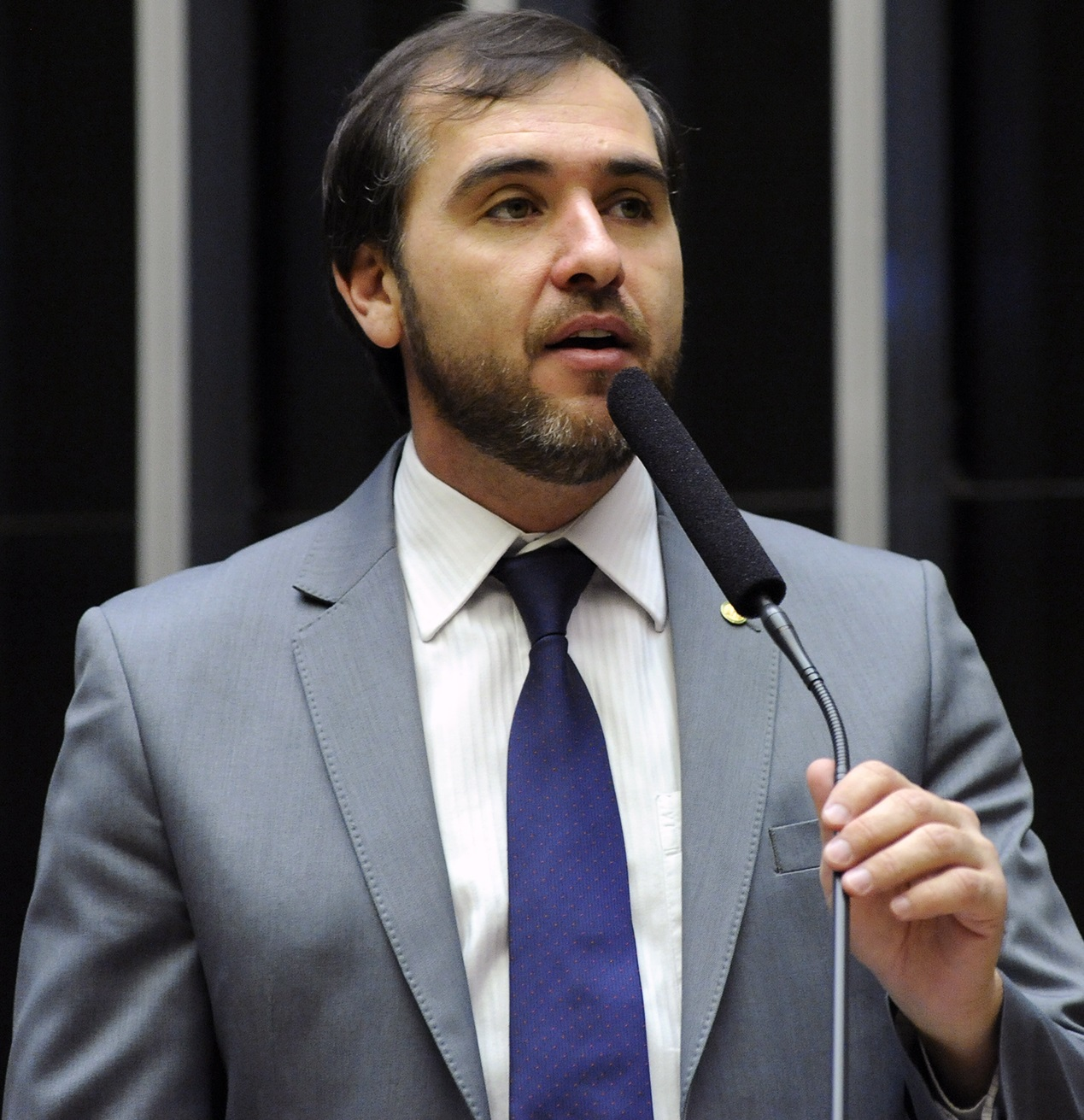 Jony Marcos em junho de 2017.